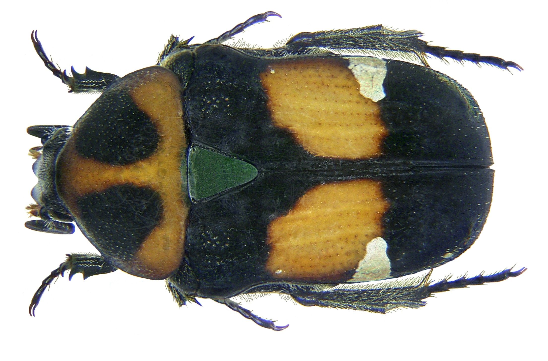 Familie: Scarabaeidae Größe: 13,4-16,6 mm Verbreitung: Südostasien Fundort: Südchina, S-Yunnan, Jinghong leg. A.Weigel, 2008; det. U.Schmidt, 2008 Foto: U.Schmidt, 2008